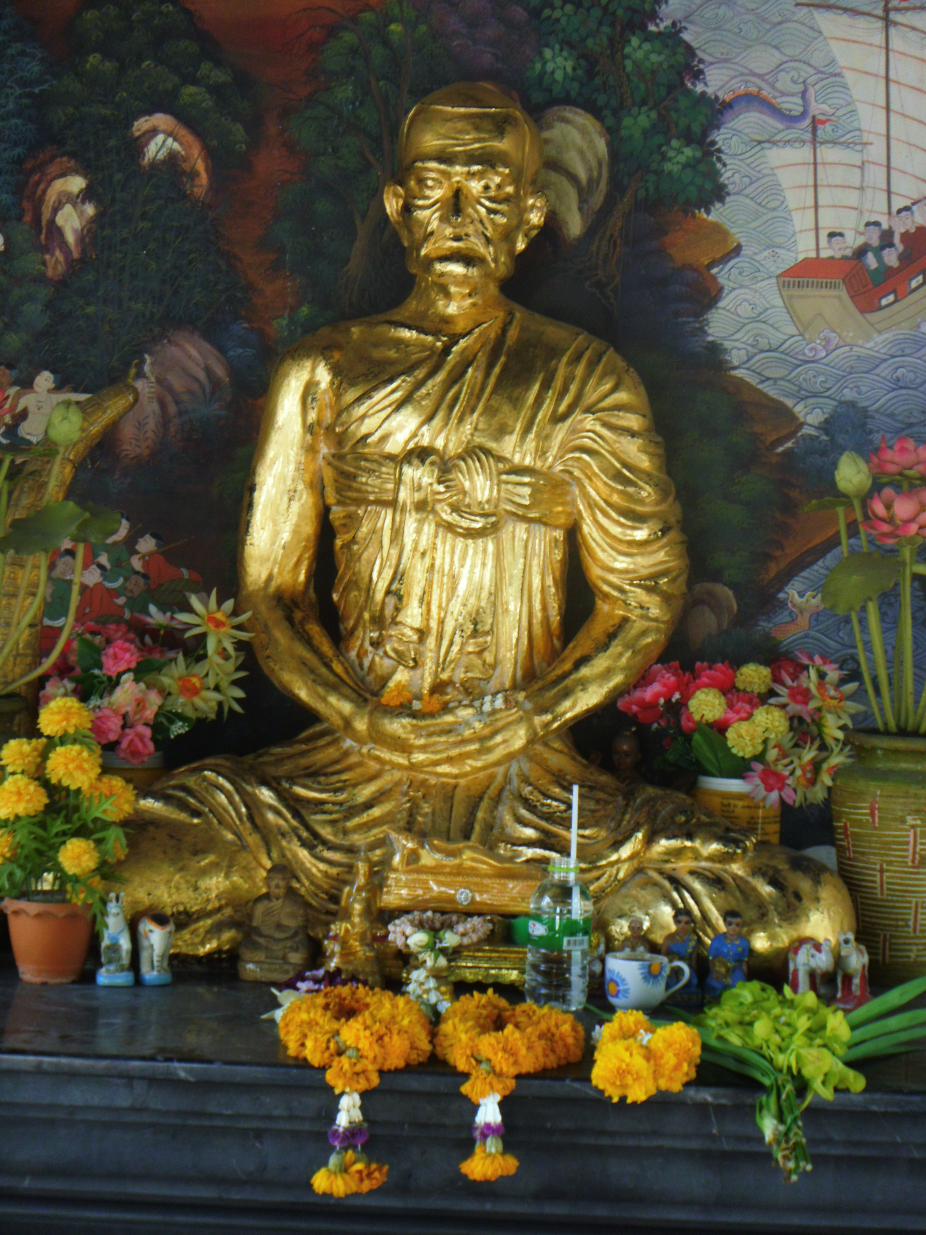 วัดประยุรวงศาวาส